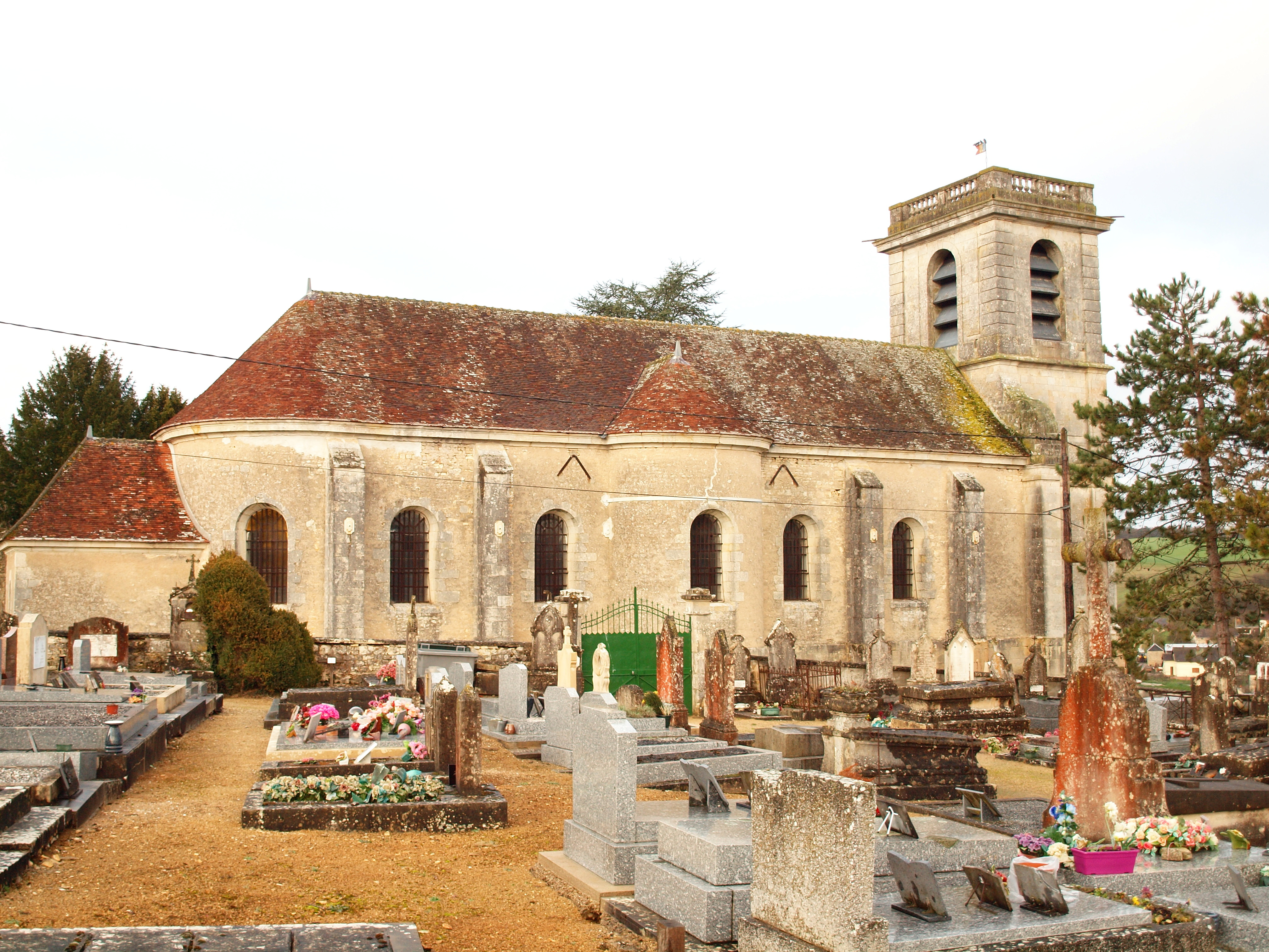 Andryes (Yonne, France) ; église